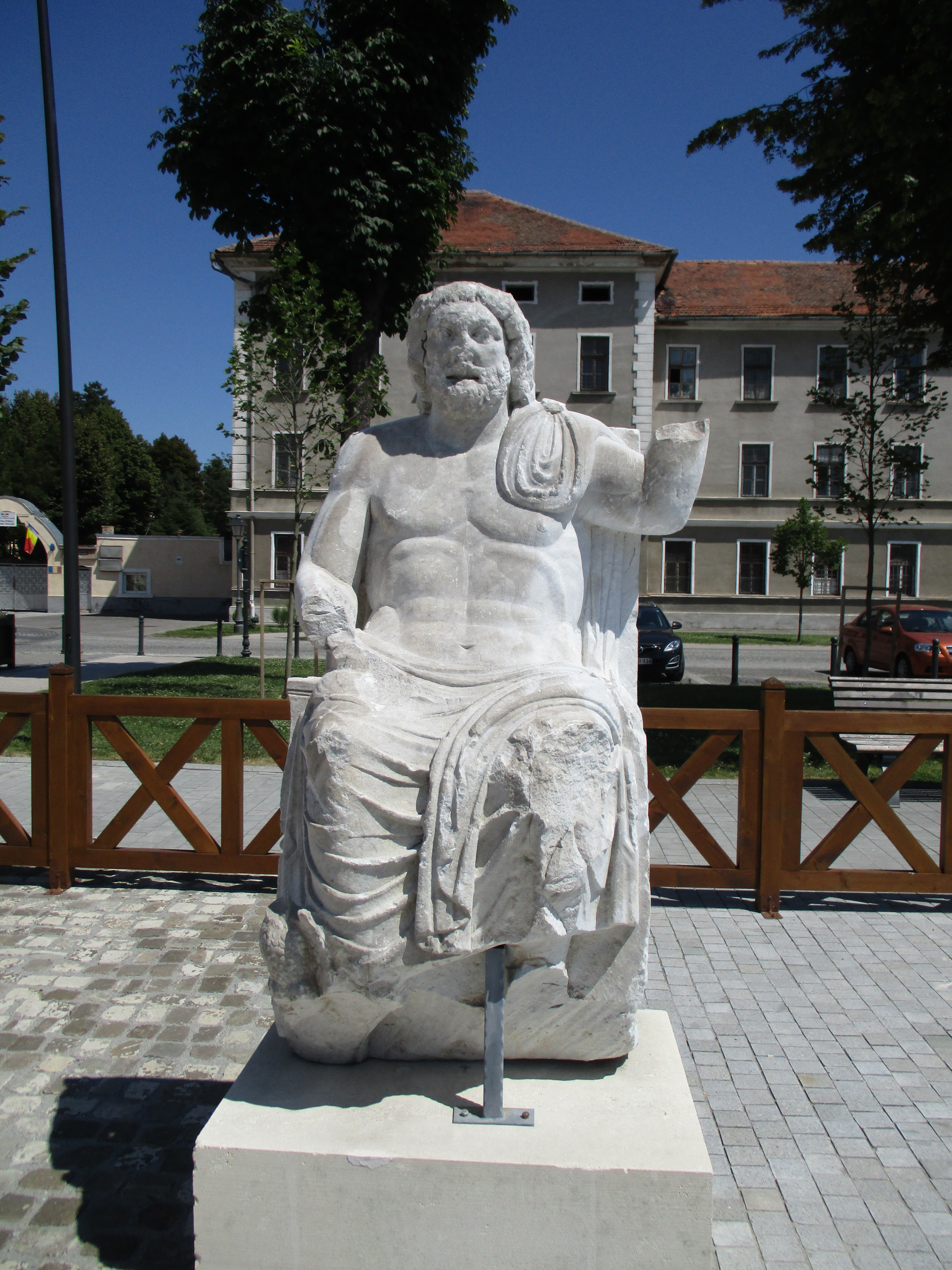 Jupiter Optimus Maximus monumentális szobra Apulumból - a szerző felvétele (2015)